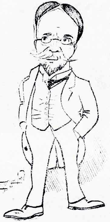 Künstlerkarikatur, Teil eines Kohlenstiftzyklus für die griechische Literaturzeitung Estia